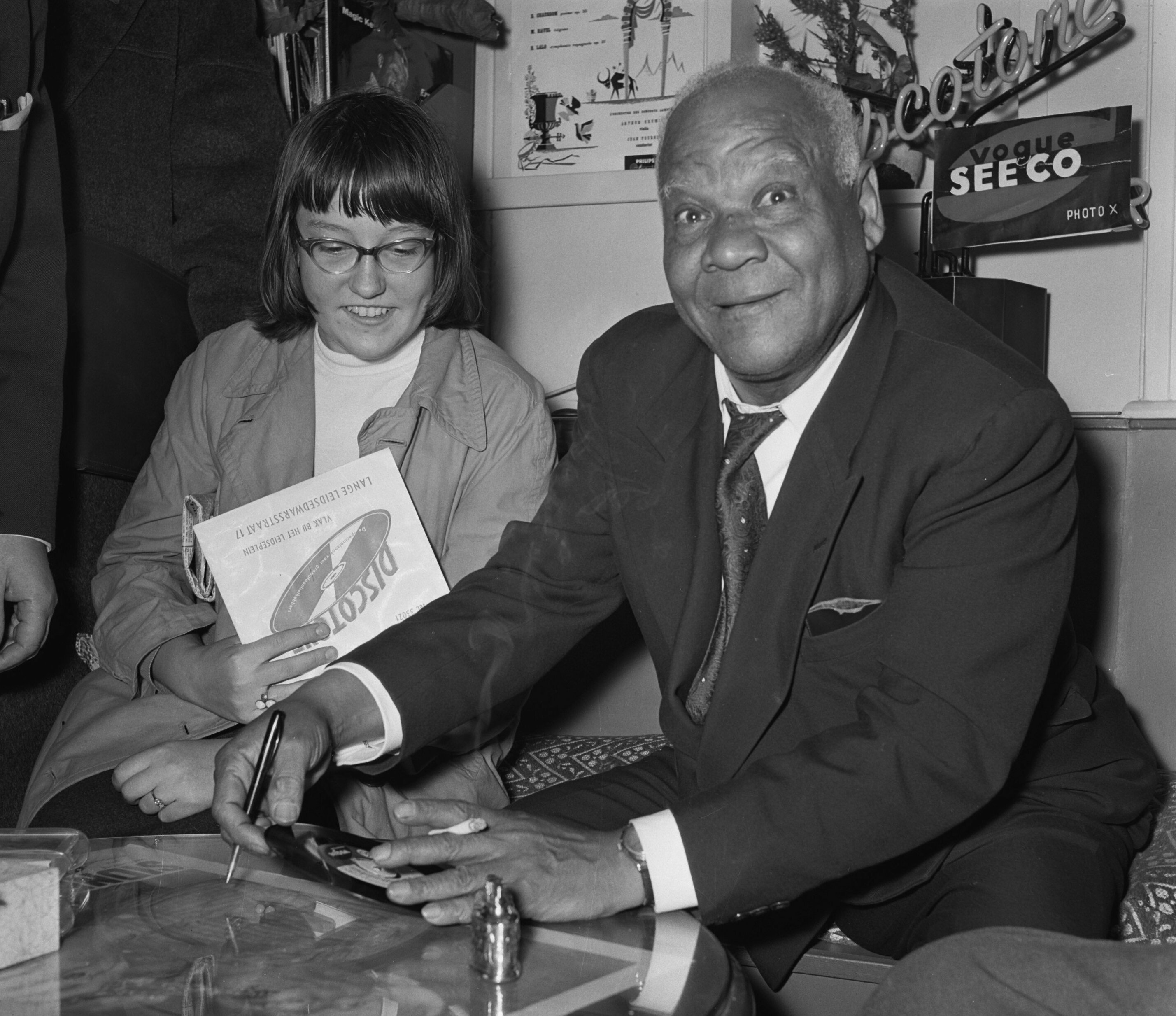 Collectie / Archief : Fotocollectie Anefo Reportage / Serie : [ onbekend ] Beschrijving : Sydney Bechet tekent grammofoonplaten bij "Discotone" eigenaar Hank van Leer L. Leidsedwarsstraat 17 ( 50 jaar jazz, sopraan, saxofonist) Datum : 6 oktober 1956 Trefwoorden : GRAMMOFOONPLATEN, Saxofonisten, eigenaars Persoonsnaam : Bechet, Sydney, Hank van Leer Fotograaf : Behrens, Herbert / Anefo Auteursrechthebbende : Nationaal Archief Materiaalsoort : Negatief (zwart/wit) Nummer archiefinventaris : bekijk toegang 2.24.01.03 Bestanddeelnummer : 908-0487 Reacties Geplaatst door Maaike op 22 juni 2014 - 14:07. Plaats: Amsterdam, Noord-Holland NB. De juiste schrijfwijze van zijn voornaam is Sidney. Sidney Bechet (New Orleans, 14 mei 1897 – Garches (Frankrijk), 14 mei 1959) was een Amerikaans jazzsaxofonist, klarinettist en componist.